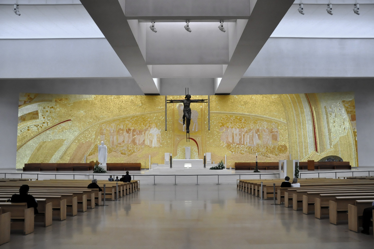 Igreja da Santissima Trindade - Kirche der Heiligsten Dreifaltigkeit